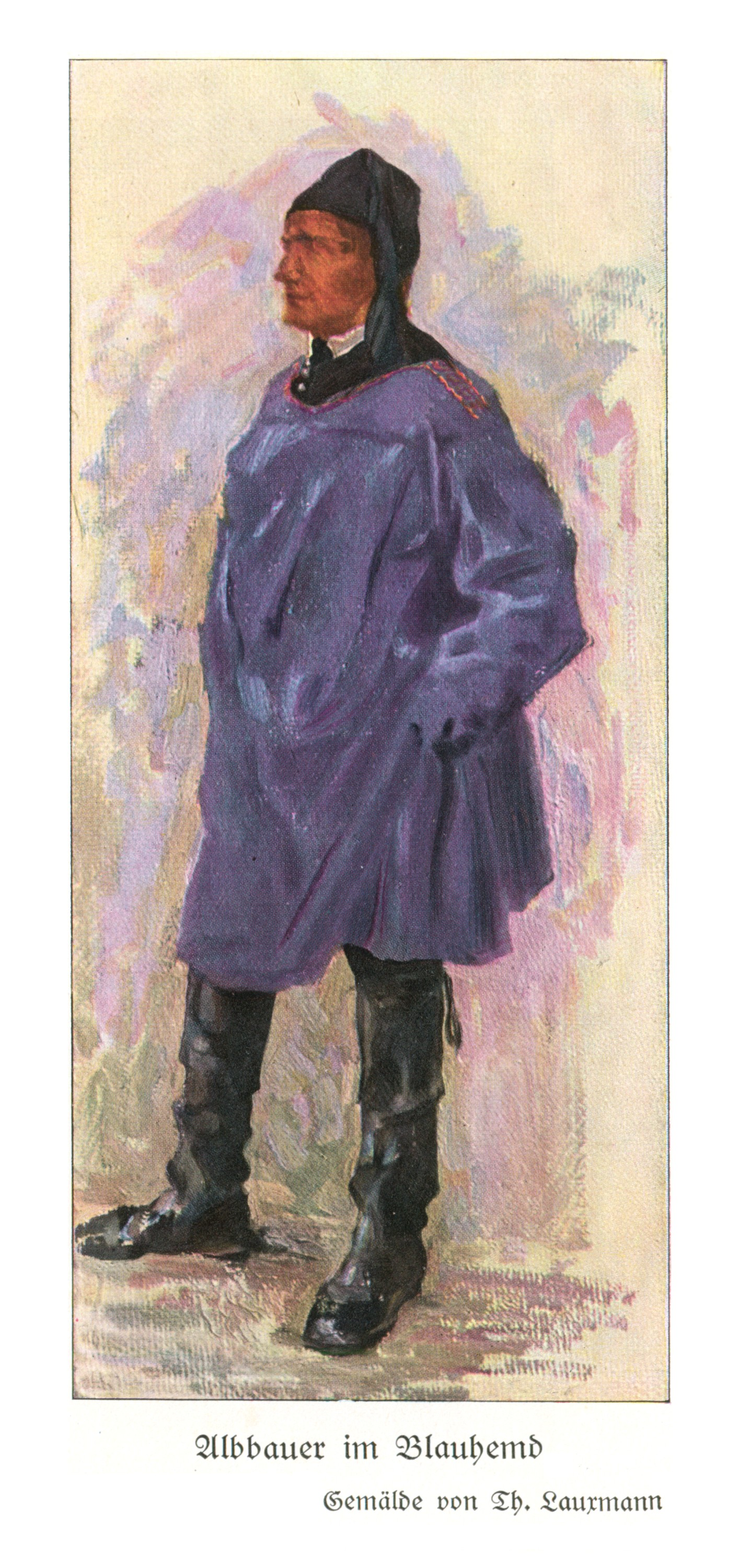 Albbauer im Blauhemd, Gemälde